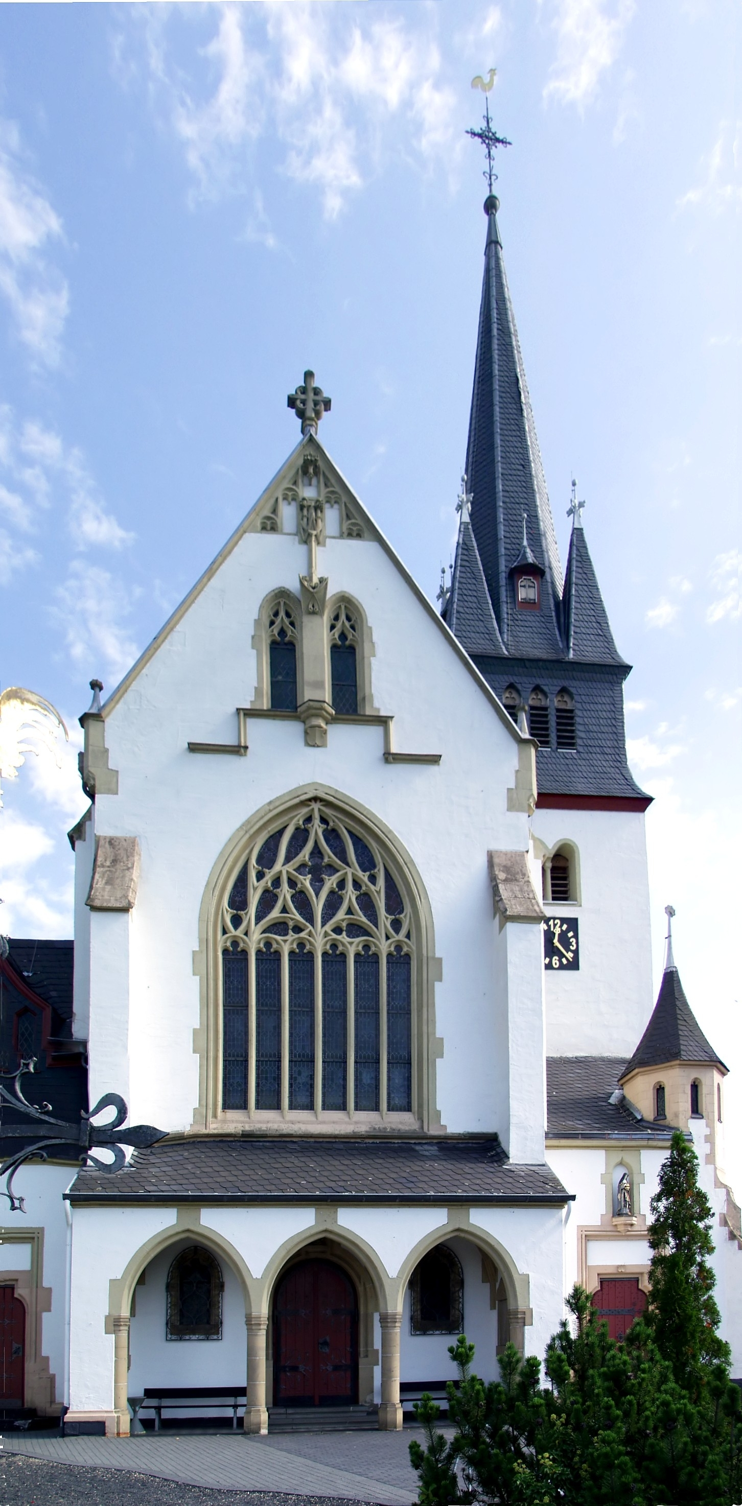 Westfassade von St. Walburgis, Leubsdorf (Verbandsgemeinde Linz am Rhein)